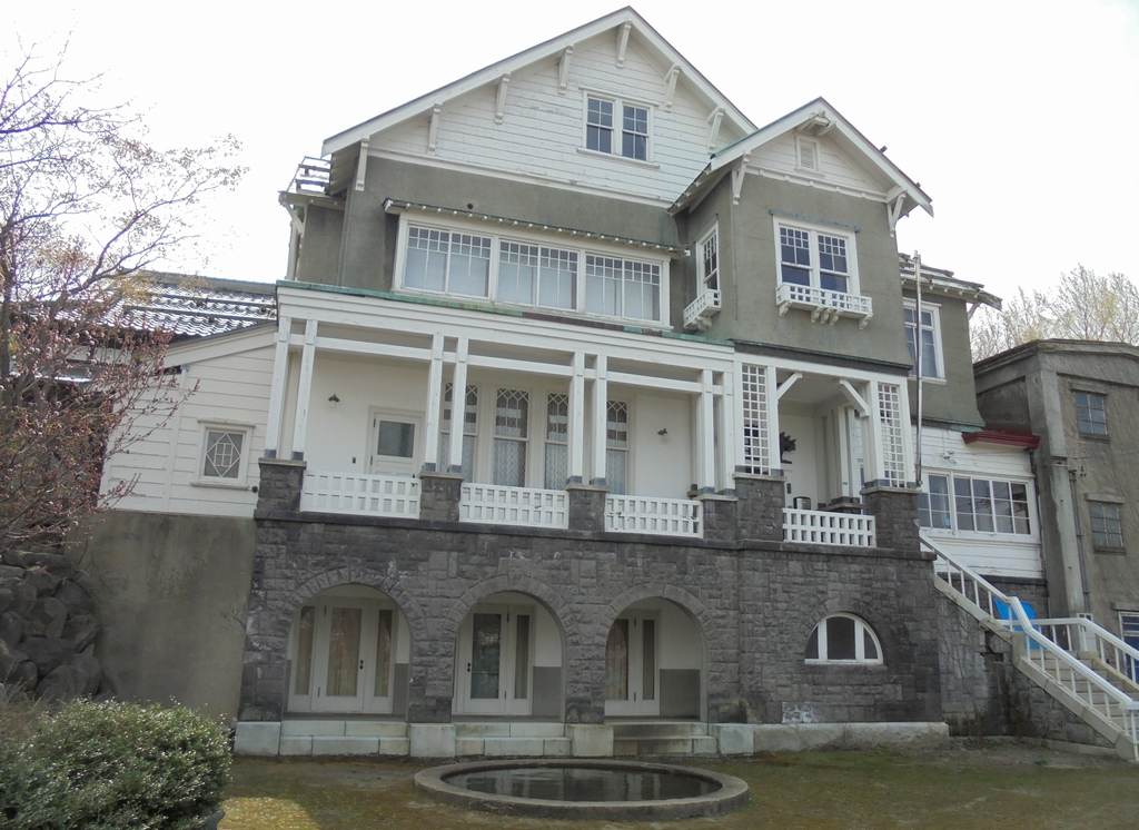 和光荘 (Wakōsō, Otaru-shi, Japan)